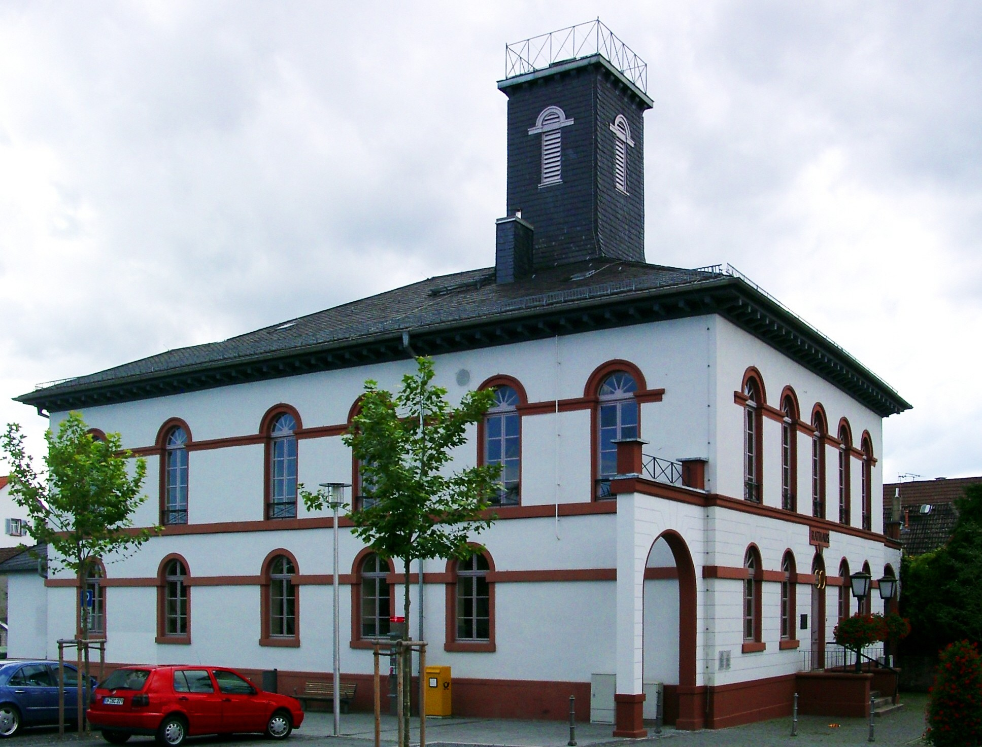 Altes Rathaus von Langen, Hessen, heute als Museum genutzt